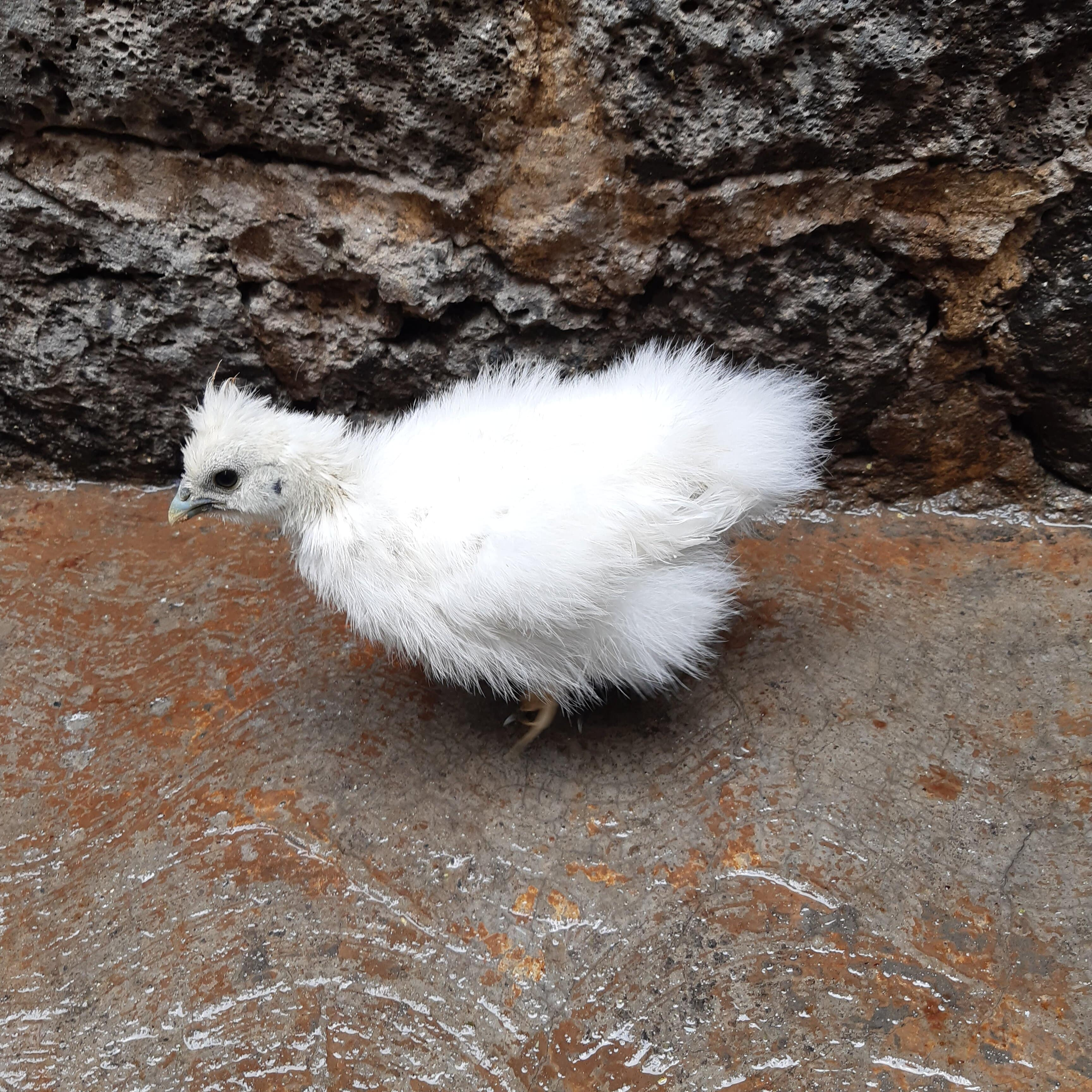 Pollito de apenas 2 meses, padres sedosos blancos.